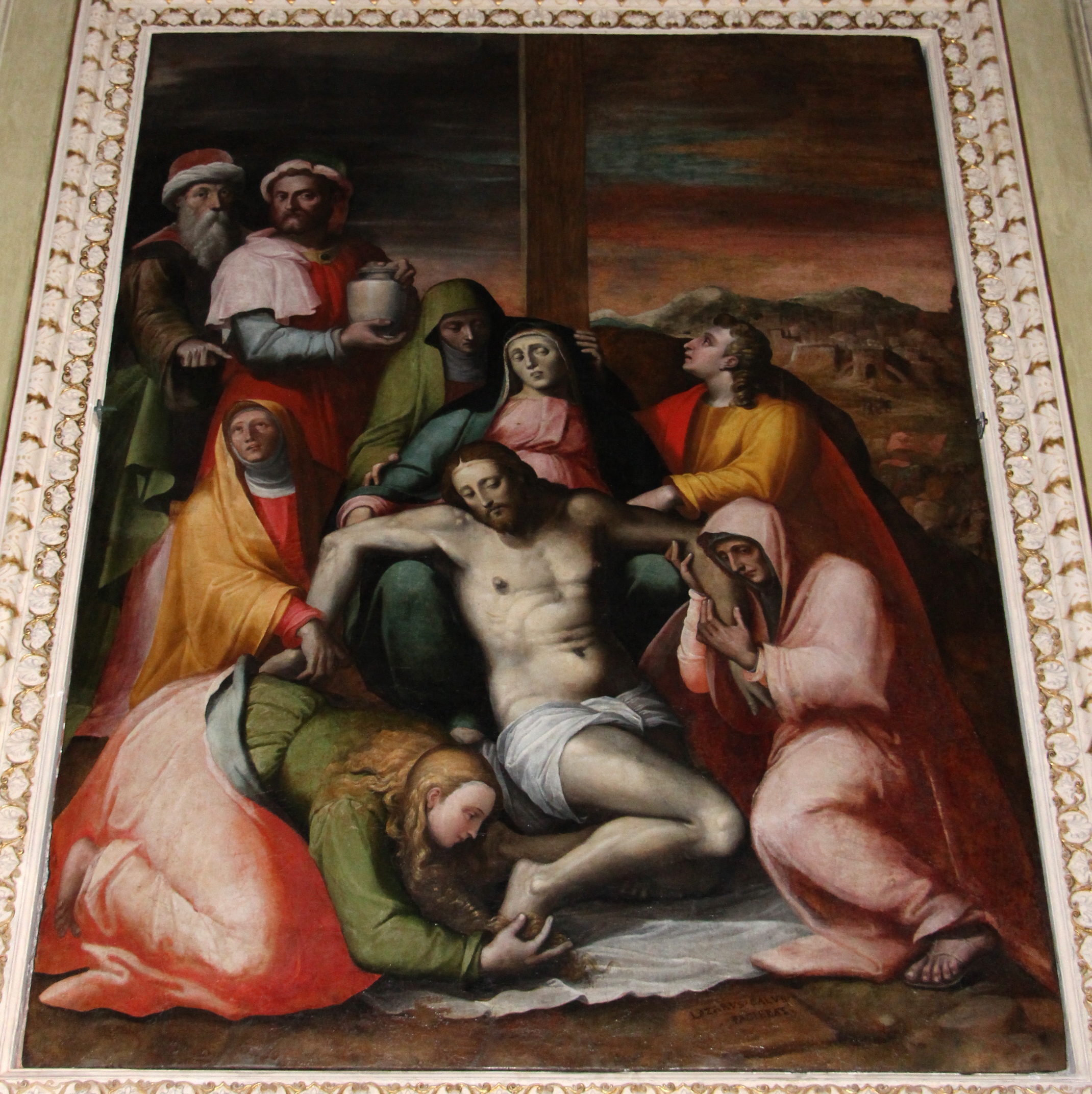 Lazzaro calvi, pietà, 01.JPG